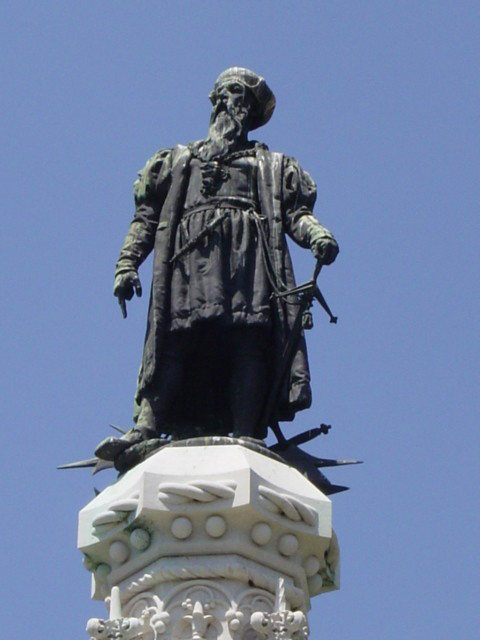 Estátua de Afonso de Albuquerque que se encontra na Praça Afonso de Albuquerque em Lisboa. Foto digitalizada